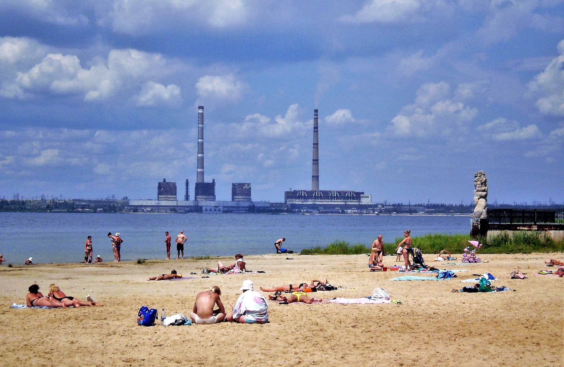 г. Светлодарск Донецкой области